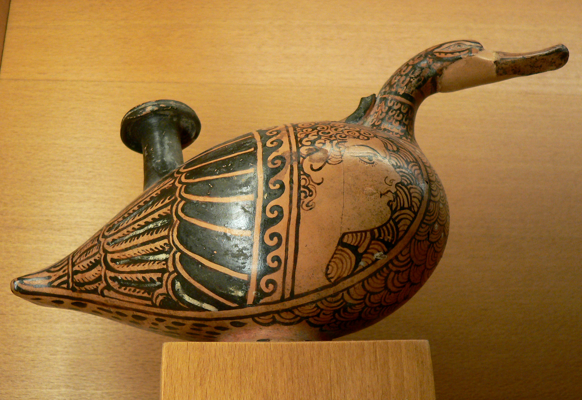 Vase plastique en forme de canard Groupe de Chiusi, 2° moitié du IV° siècle av. J.-C. Terre cuite H.: 12 cm; L. 20 cm Paris, Musée du Louvre, N° inventaire : H 50 Source: Clio20